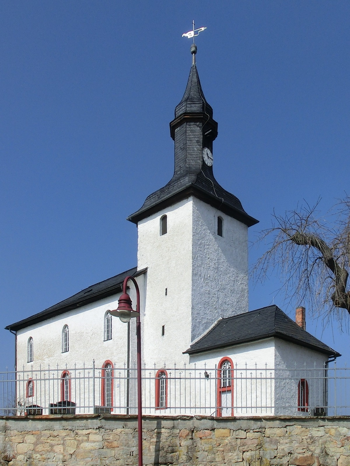 Kirche in Mötzelbach von Südosten